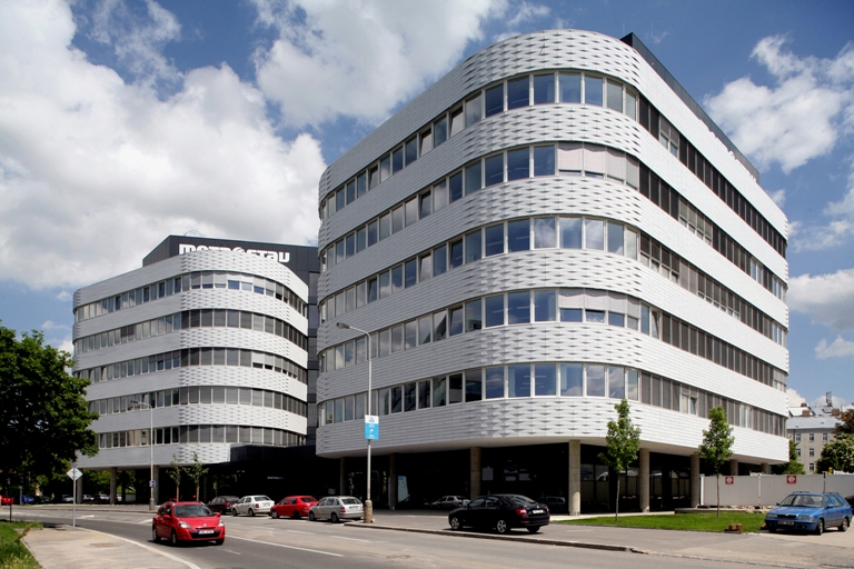 Palmovka Park II